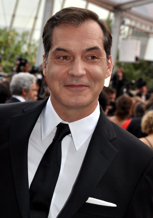 Samuel Labarthe au Festival de Cannes 2011 pour le film La Conquête, dans lequel il joue le rôle de Dominique de Villepin.